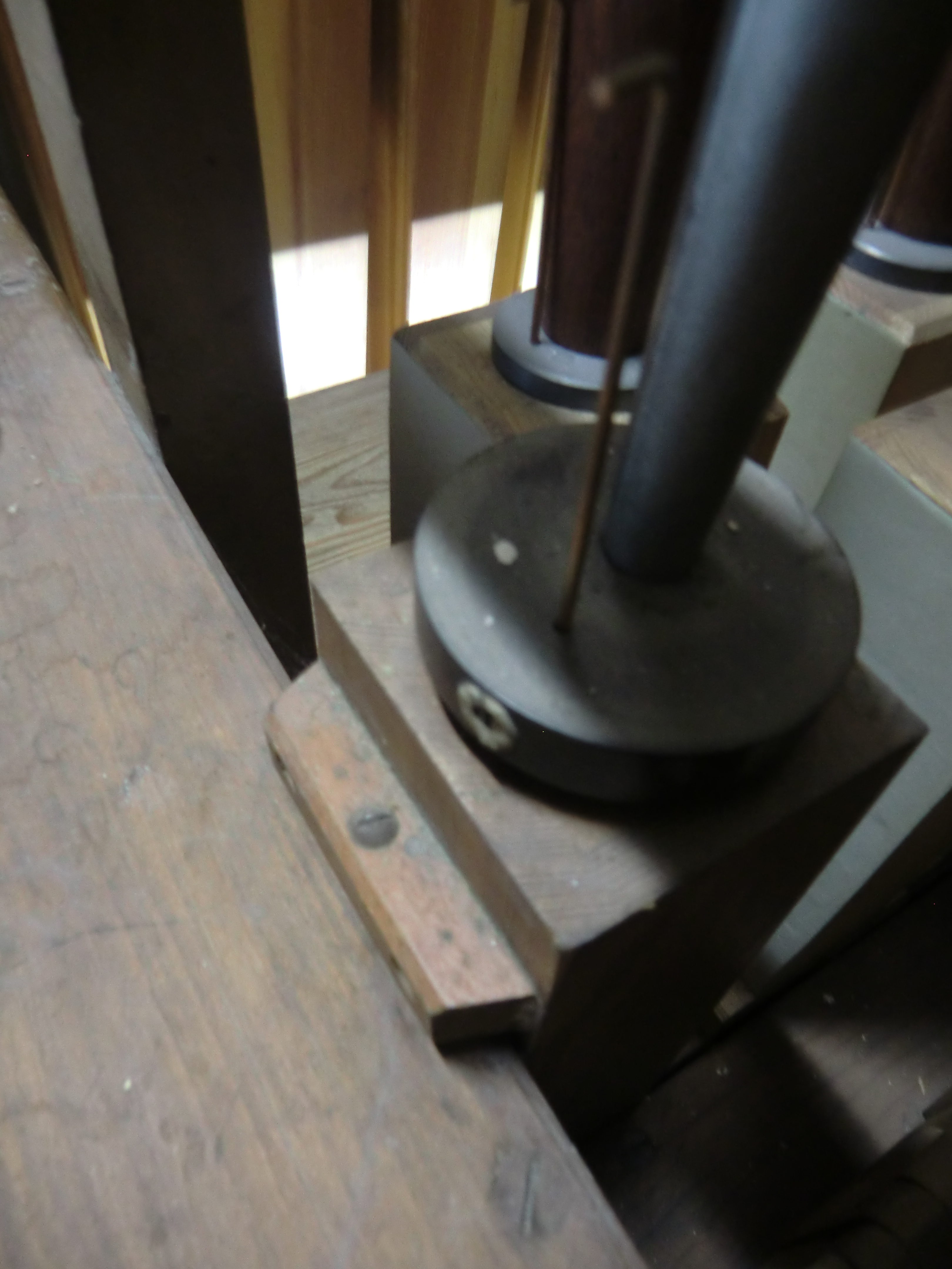 Orgel in Herschbach (1915): Posaunenbass 16´ - gedrechselter Holzkopf (Ton d1)